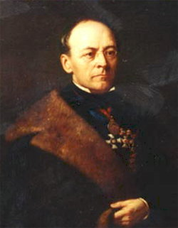 Portrait, Ablichtung eines Gemäldes von Franz Reiff 1870